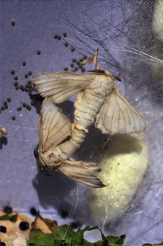 Copula de la papallona de seda